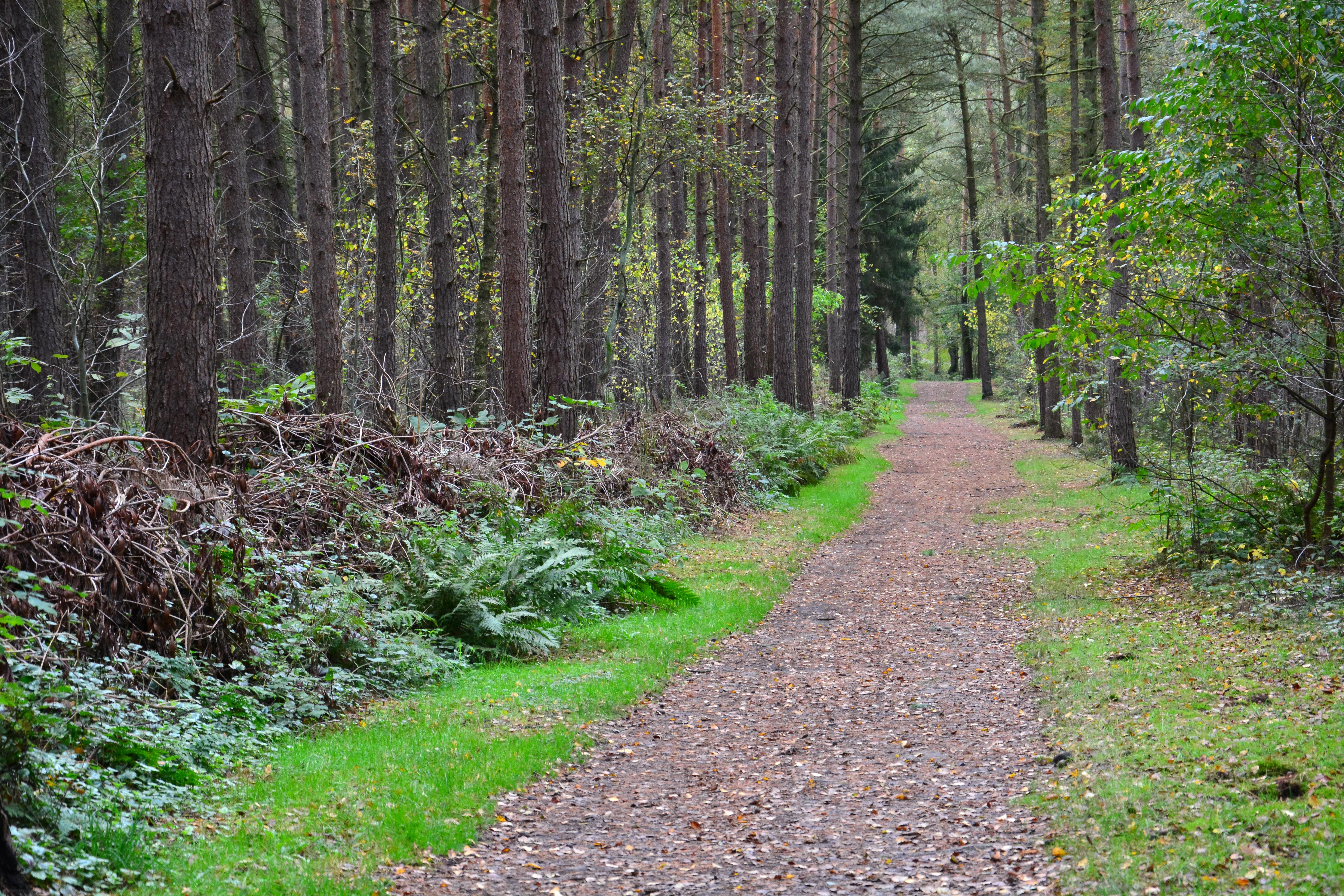 Waldweg mit Benjeshecke im Klövensteen